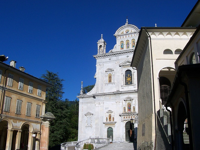 Varallo Sesia - Basilica dell'Assunta al Sacro Monte